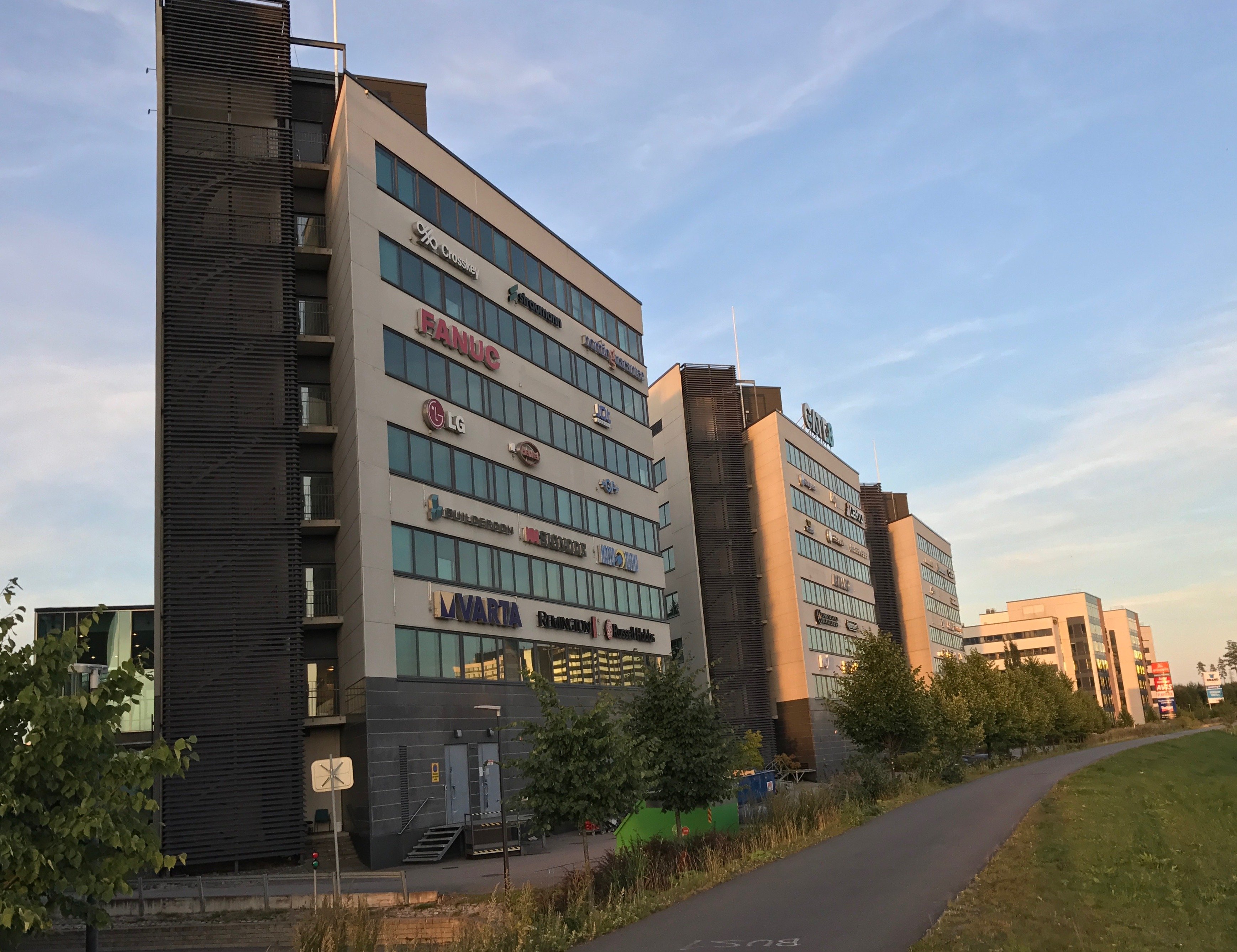 Gate8 Business Park toimistorakennus Vantaan Äyritiellä.